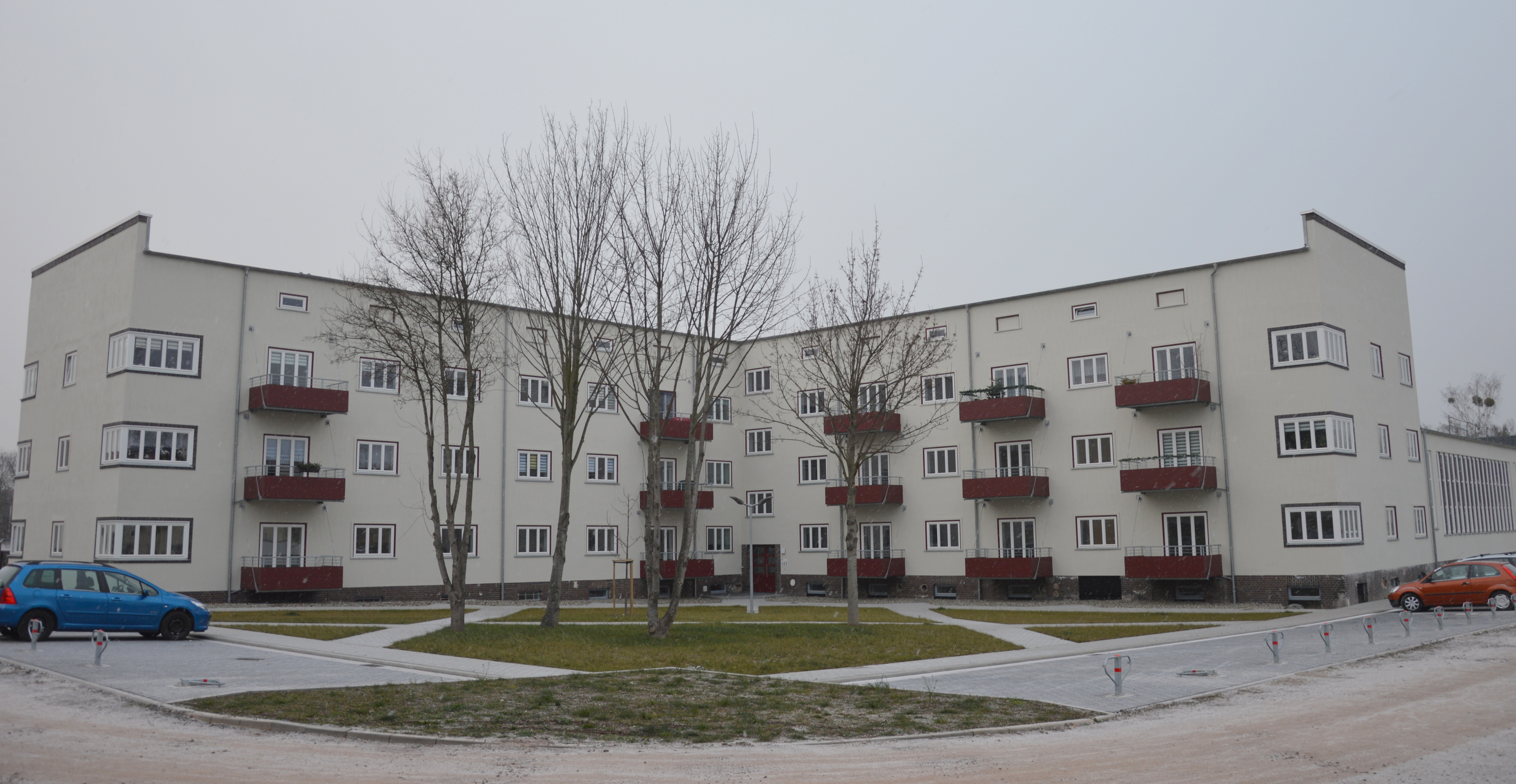 Haus Emanuel-Larisch-Weg 21 in Magdeburg